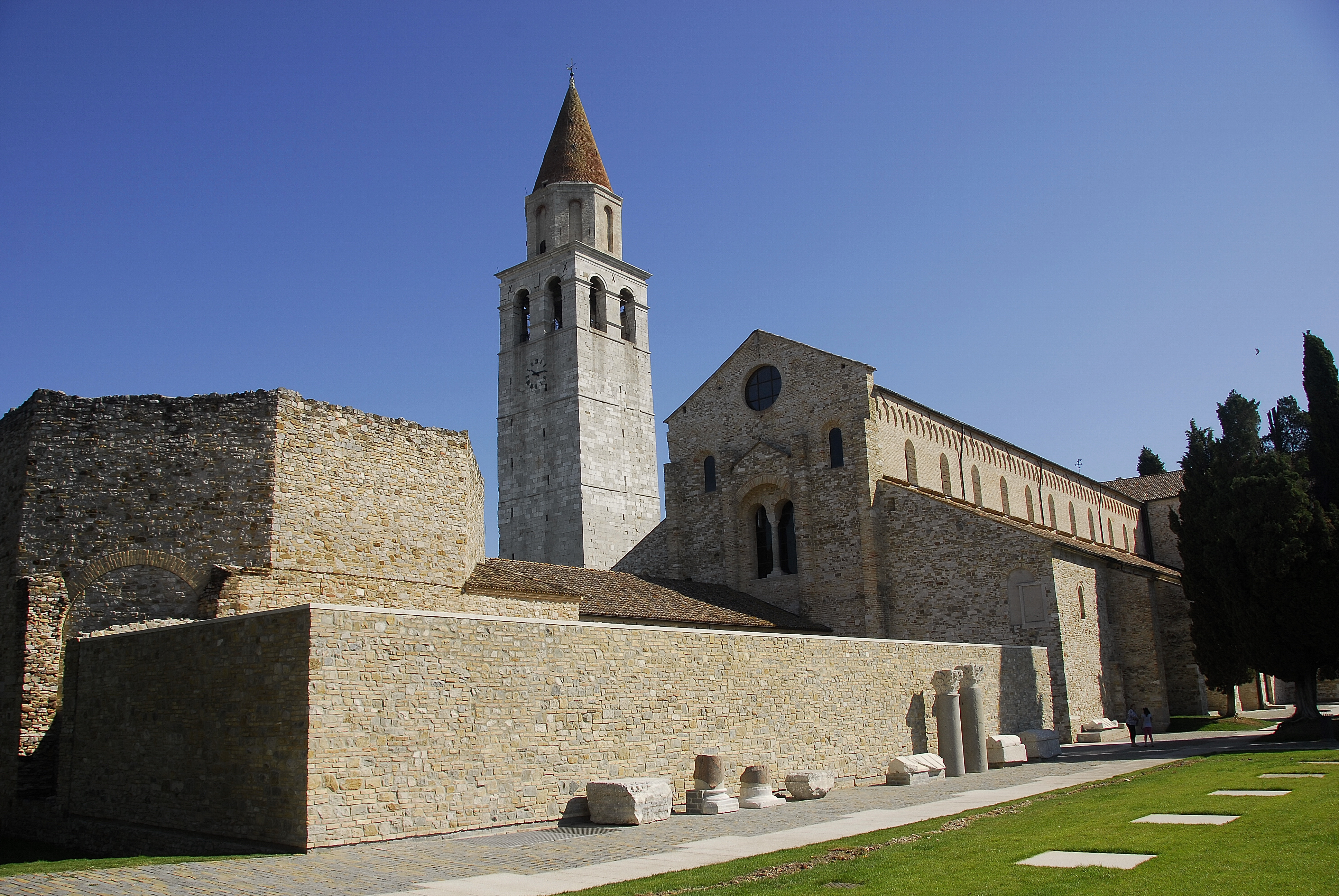 Aquileia (UD), ITA